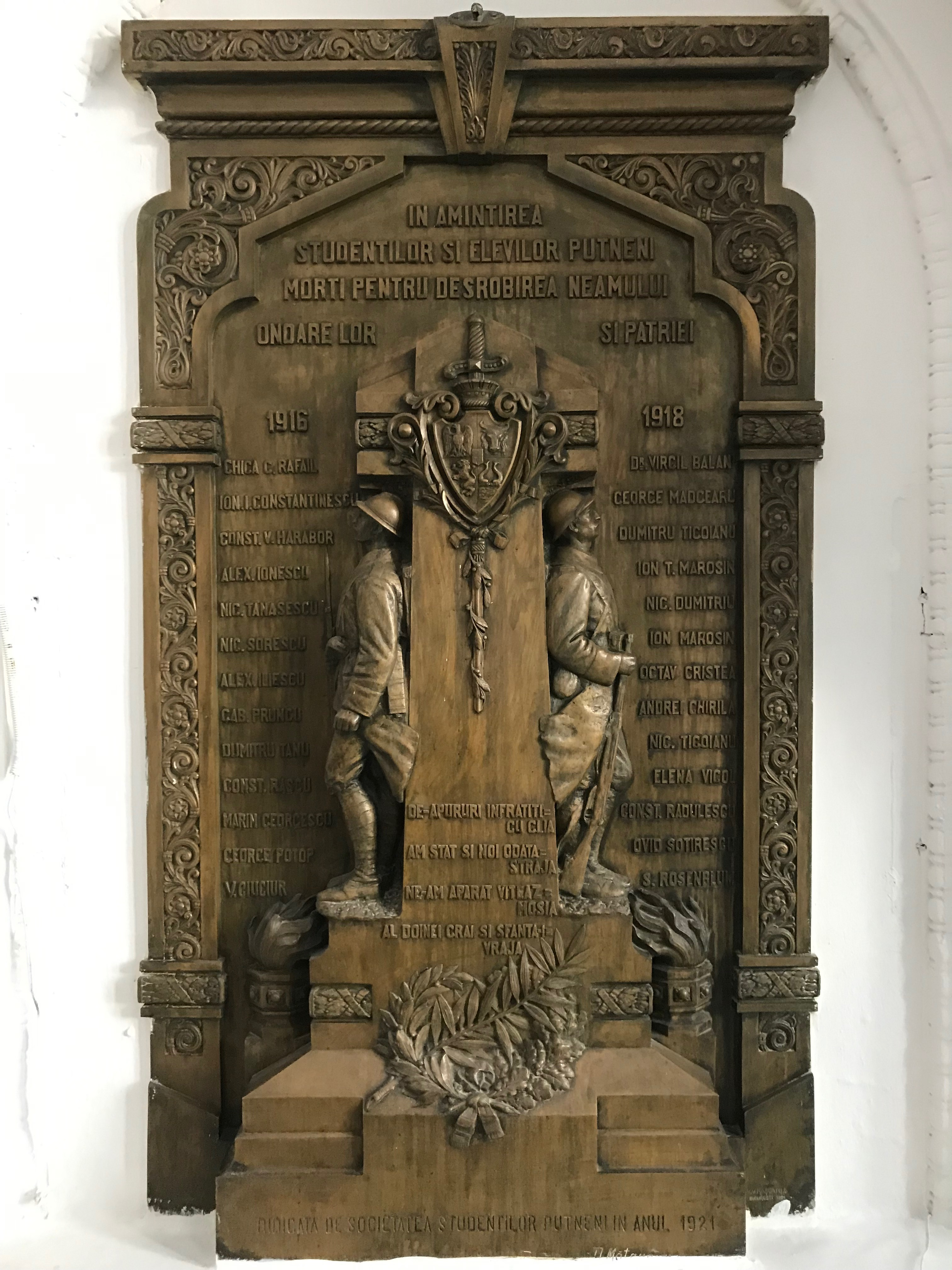 Placă comemorativă Societatea Studenților Putneni este amplasată în holul Colegiului Național Unirea din Focșani